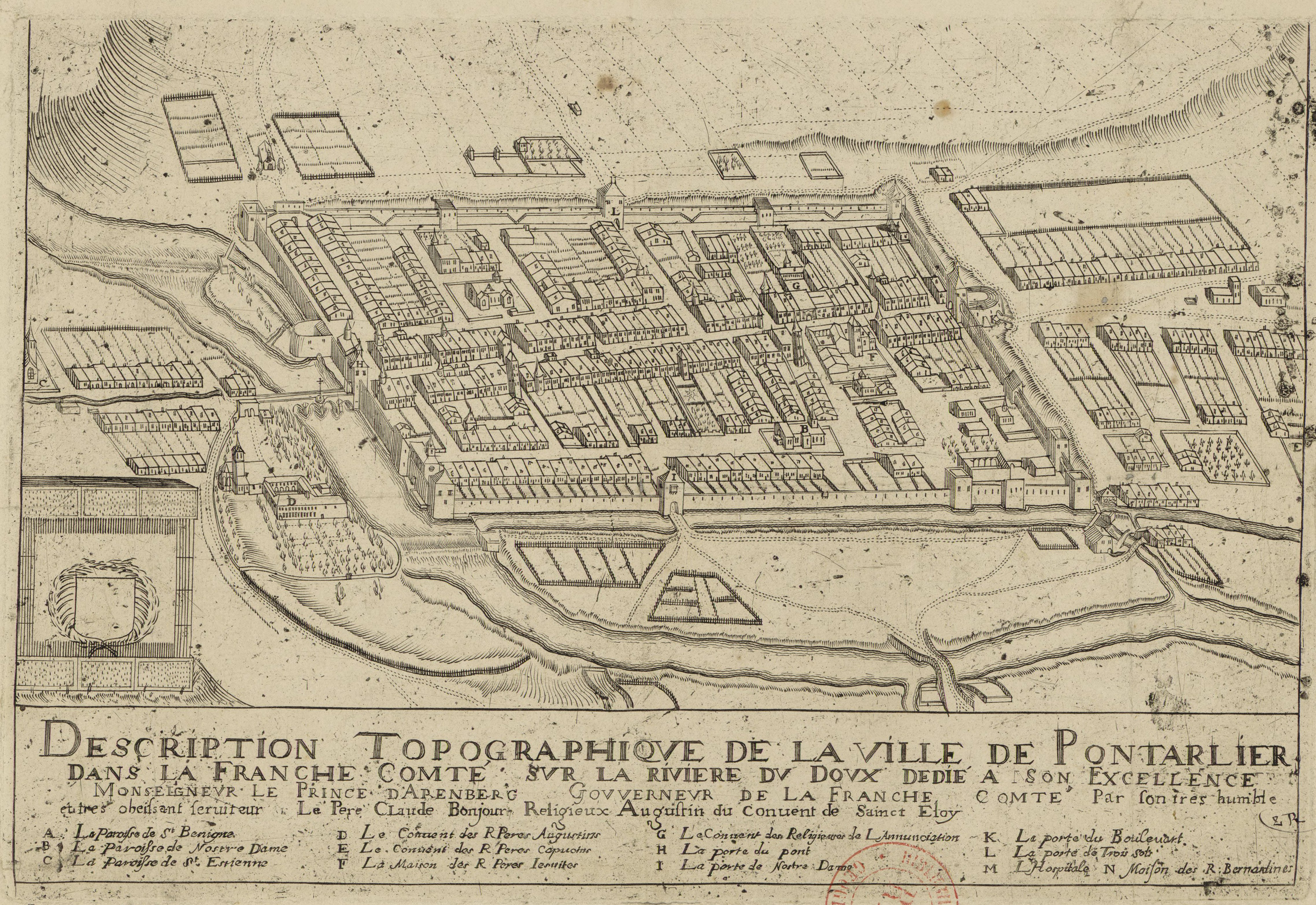 Description topographique de la ville de Pontarlier, dans la Franche Comté, sur la rivière du Doux [Doubs] dédié à son Excellence Monseigneur le Prince d'Arenberg, Gouverneur de la Franche Comté, par son très humble et très obéissant serviteur le père Claude Bonjour, religieux Augustin du convent [couvent] de Sainct-Eloy. A. La paroisse de St Benigne B. La paroisse de Nostre Dame C. La paroisse de St Estienne D. Le convent des R. Pères Augustins E. Le convent des R. Pères Capucins F. La maison des R. Pères Jesuites G. Le convent des Religieuses de l'Annonciation H. La porte du pont I. La porte de Nostre Dame K. La porte du Boulevart L. La porte des Trois sols M. L'Hospitale N. Maison des R. Bernardins